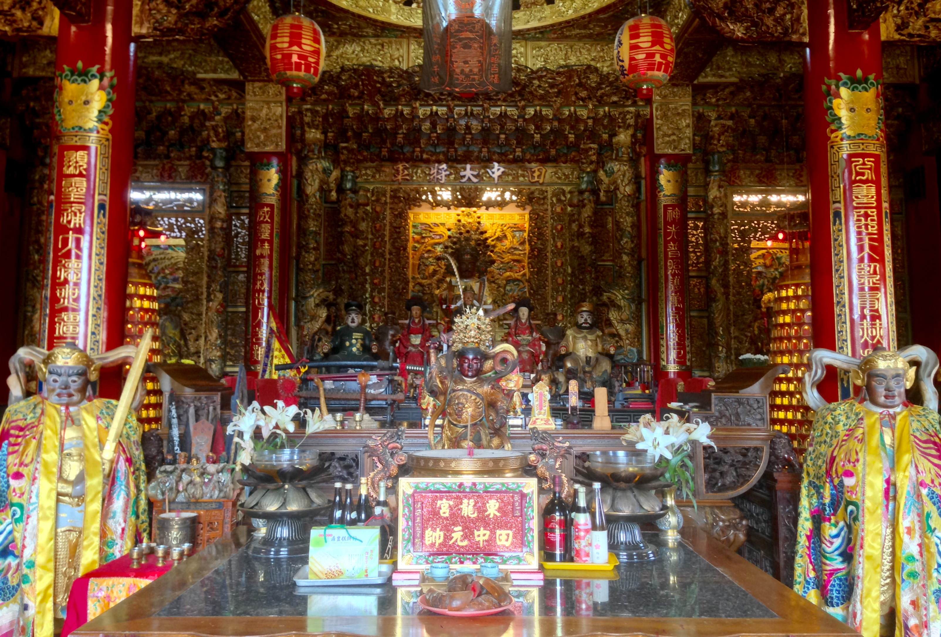 中文（台灣）: 枋寮東龍宮殿內神像正照